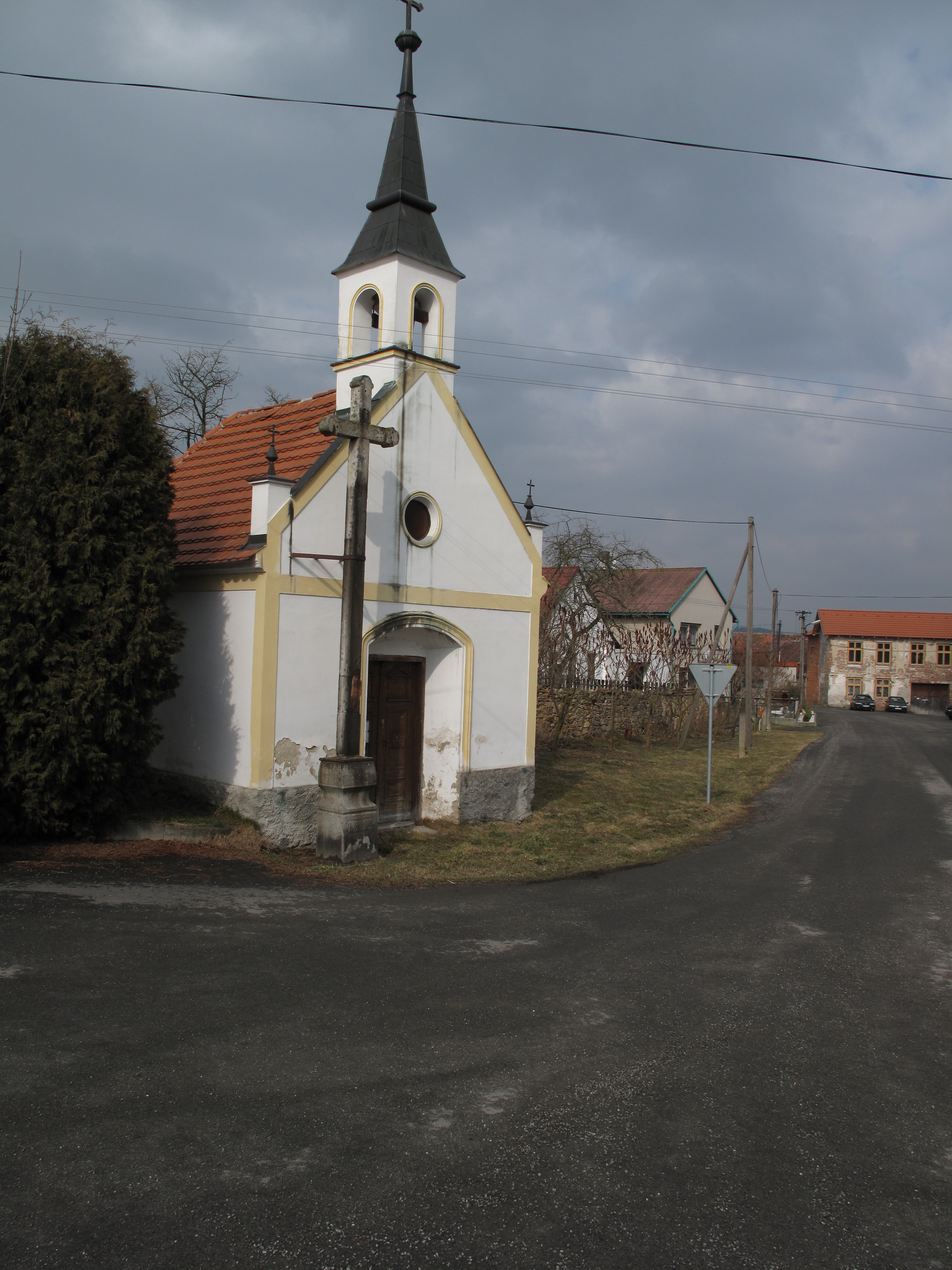 Kaplička ve Všechlapech. Okres Strakonice, Česká republika.